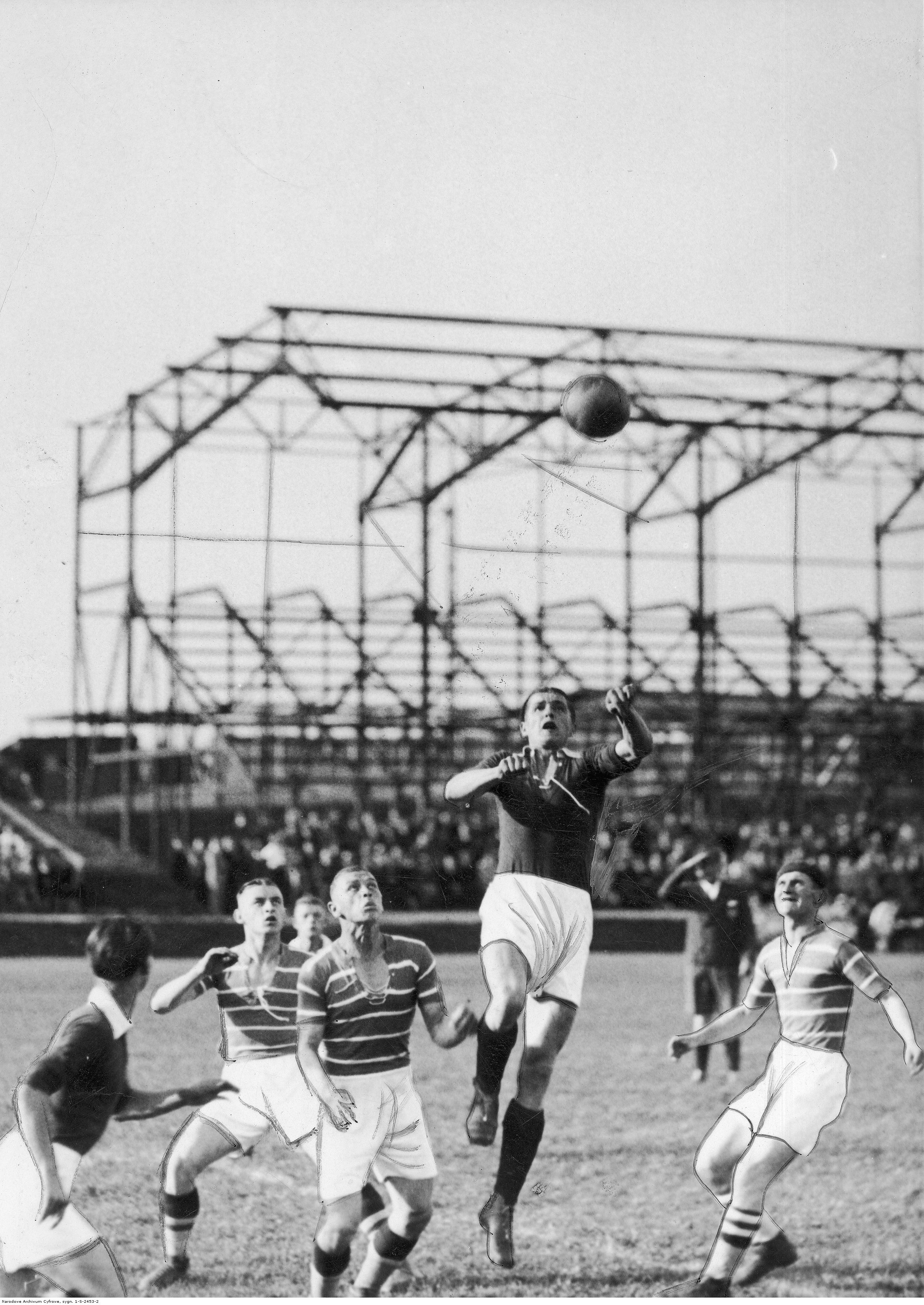 Fragment meczu.Teodor Peterek wyskakuje do piłki.